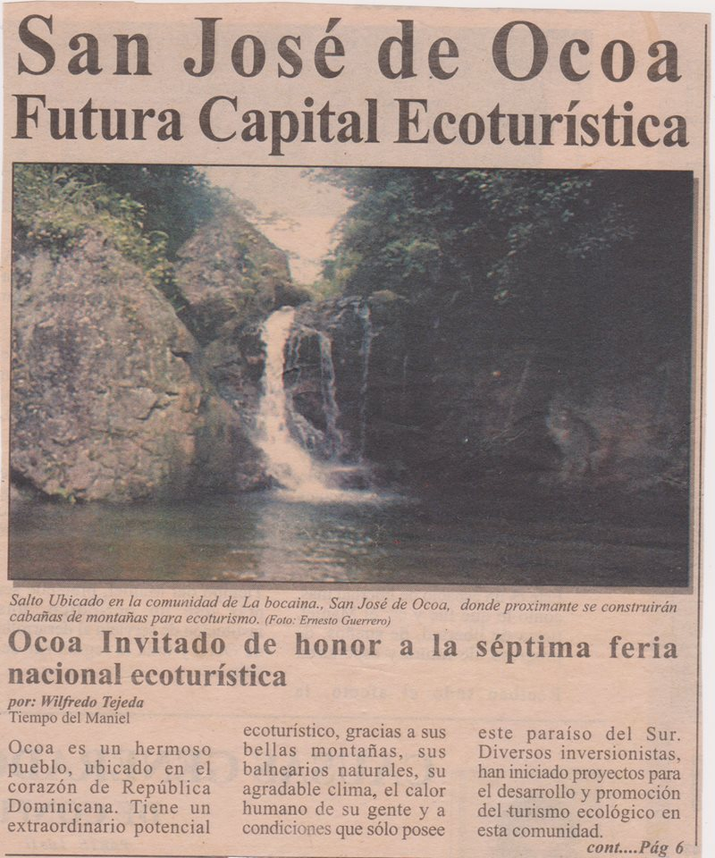 Articulo de finales de los años 90, del periódico Tiempos del Maniel